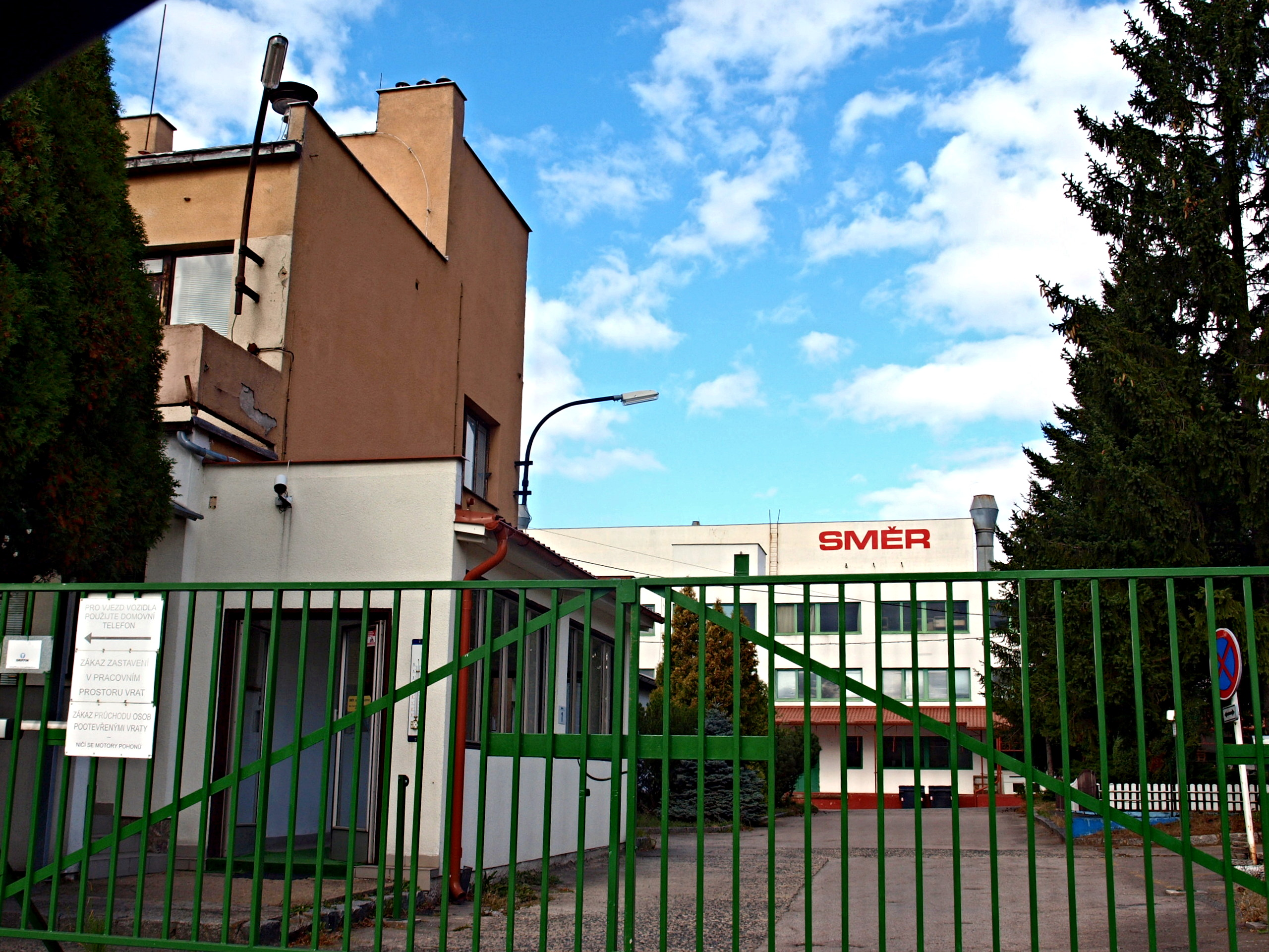 Praha 10-Petrovice